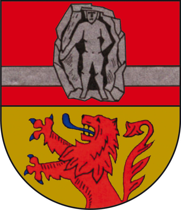 Wappen von Hottenbach